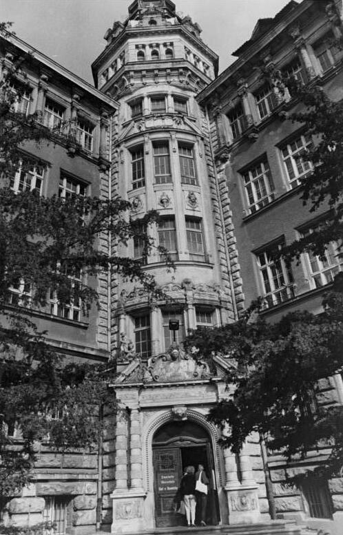 Berlin, Pankow, Oberschule "Carl von Ossietzky" ADN-ZB Link 15.4.87 Berlin: Die Erweiterte Oberschule Carl von Ossietzky in Pankow - Carl von Ossietzky, geboren am 3. Oktober 1889, verstarb am 4.Mai 1938 an Folgen der KZ-Haft. Er war ein antifaschistischer Publizist und arbeitete seit 1926 and der Woechnschrift "Die Weltbühne". Unter seiner Leitung wurde sie noch stärker als zuvor zum Kampfblatt gegen Militärismus und Faschismus. In der Nacht nach dem Reichstagsbrand (27.-28.2.33) wurde er von den Faschisten verhaftet und in verschiedene Konzentrationslager verschleppt. Ossietzky, dem 1936 der Friedensnobelpreis zuerkannt wurde, mußte auf Grund internationaler Proteste zwar freigelassen werden, stand aber bis zu seinem Tode unter Gestapoaufsicht.